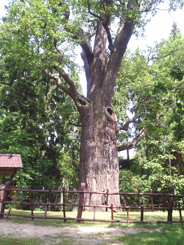 Zdjęcie Dębu Chrobrego (Quercus robur).